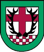 Wappen der Verbandsgemeinde Hermeskeil This file depicts the coat of arms of a German Körperschaft des öffentlichen Rechts (corporation governed by public law). According to § 5 Abs. 1 of the German Copyright law, official works like coats of arms are in the public domain. Note: The usage of coats of arms is governed by legal restrictions, independent of the copyright status of the depiction shown here. This coat of arms image could be re-created using vector graphics as an SVG file. This has several advantages; see Commons:Media for cleanup for more information. If an SVG form of this image is available, please upload it and afterwards replace this template with vector version available|new image name . It is recommended to name the SVG file "Wappen1 verb hermeskeil.svg" - then the template Vector version available (or Vva) does not need the new image name parameter.